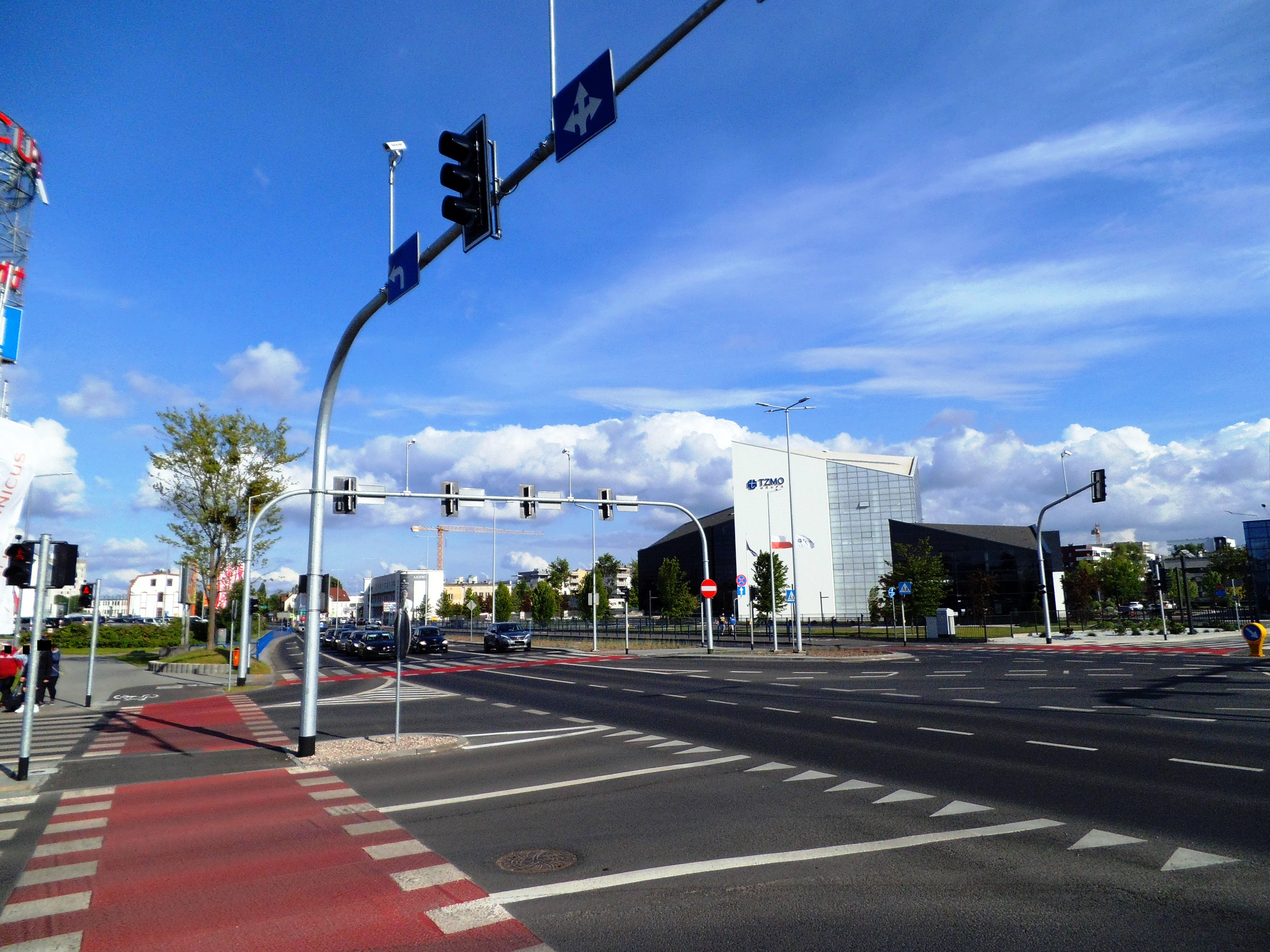 Ulica Stefana Żółkiewskiego w Toruniu,2020